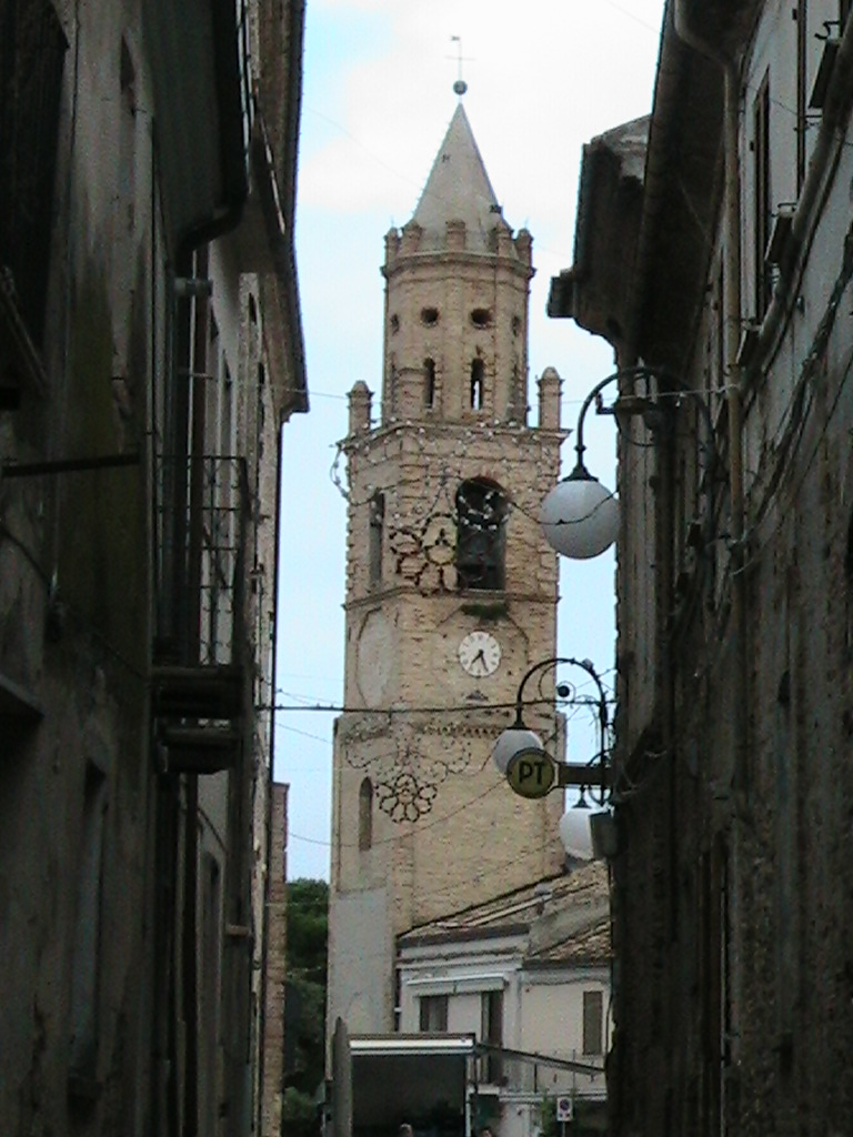 Scorcio